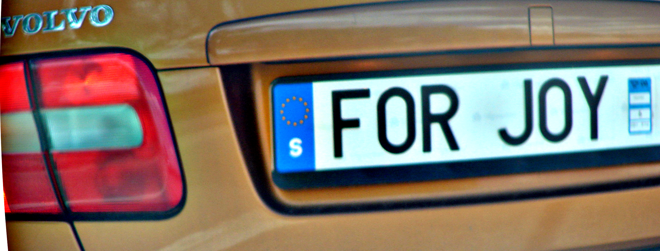 Wunschkennzeichen aus Schweden